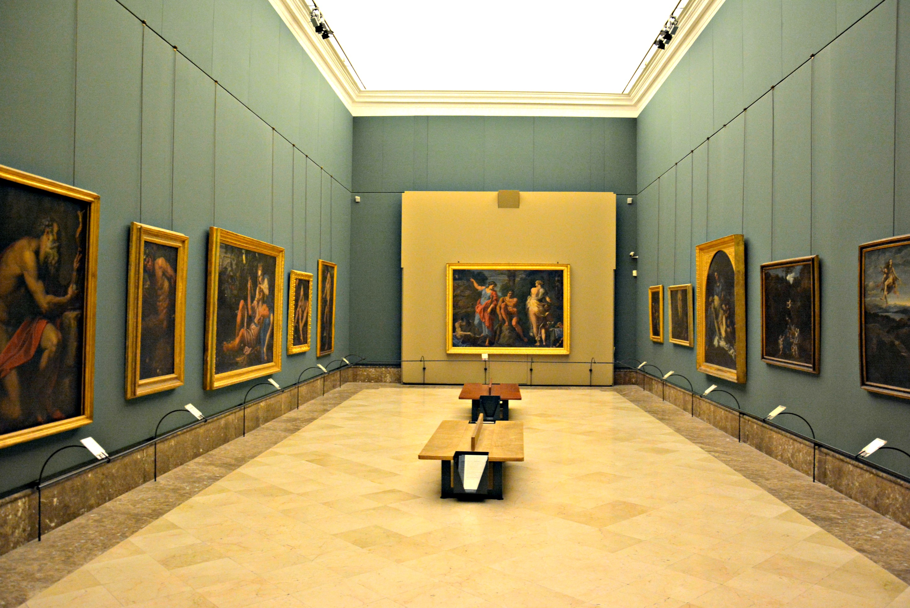 Sala 20 del Museo nazionale di Capodimonte